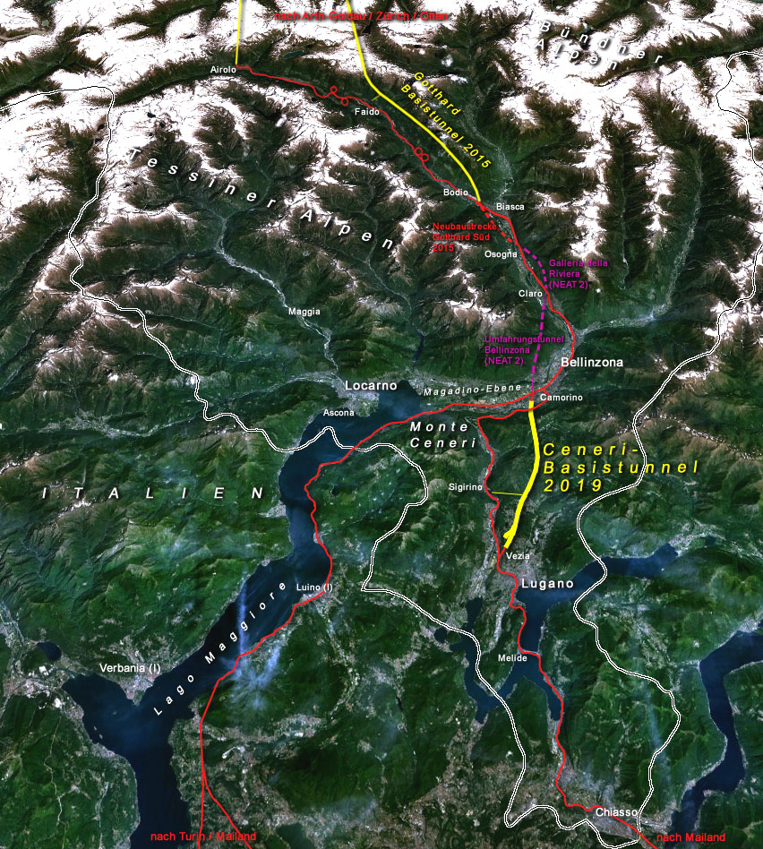 Situation der Gotthardachse Süd der Neuen Eisenbahn-Alpentransversale NEAT in der Schweiz (pink: diese Tunnels sowie die Magadino-Querung und der Knoten Camorino sind Projektstudien im Rahmen der sogenannten NEAT 2)